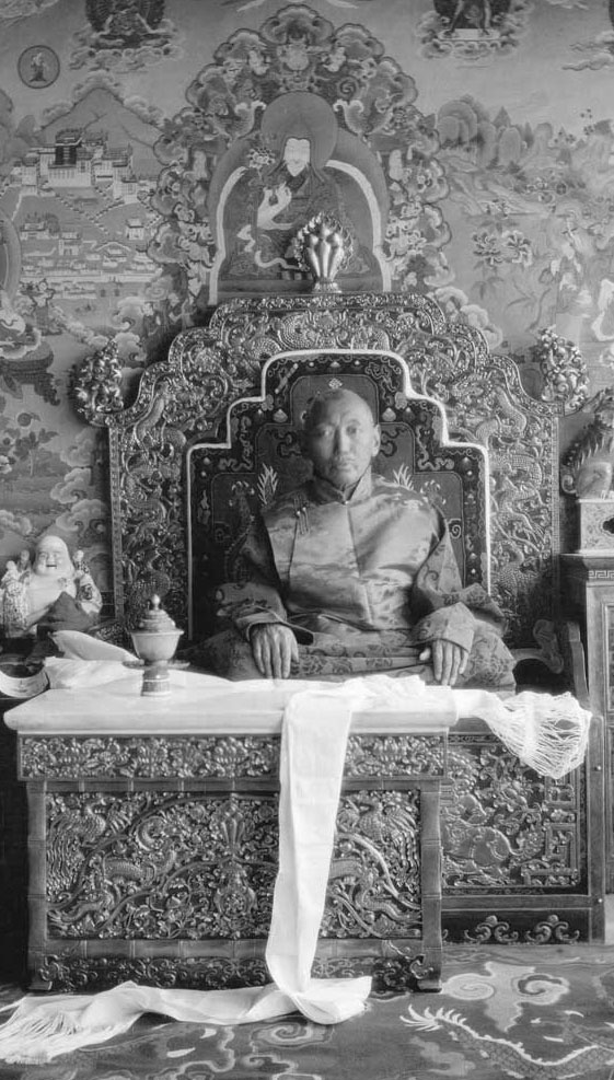 13th Dalai Lama in 1932